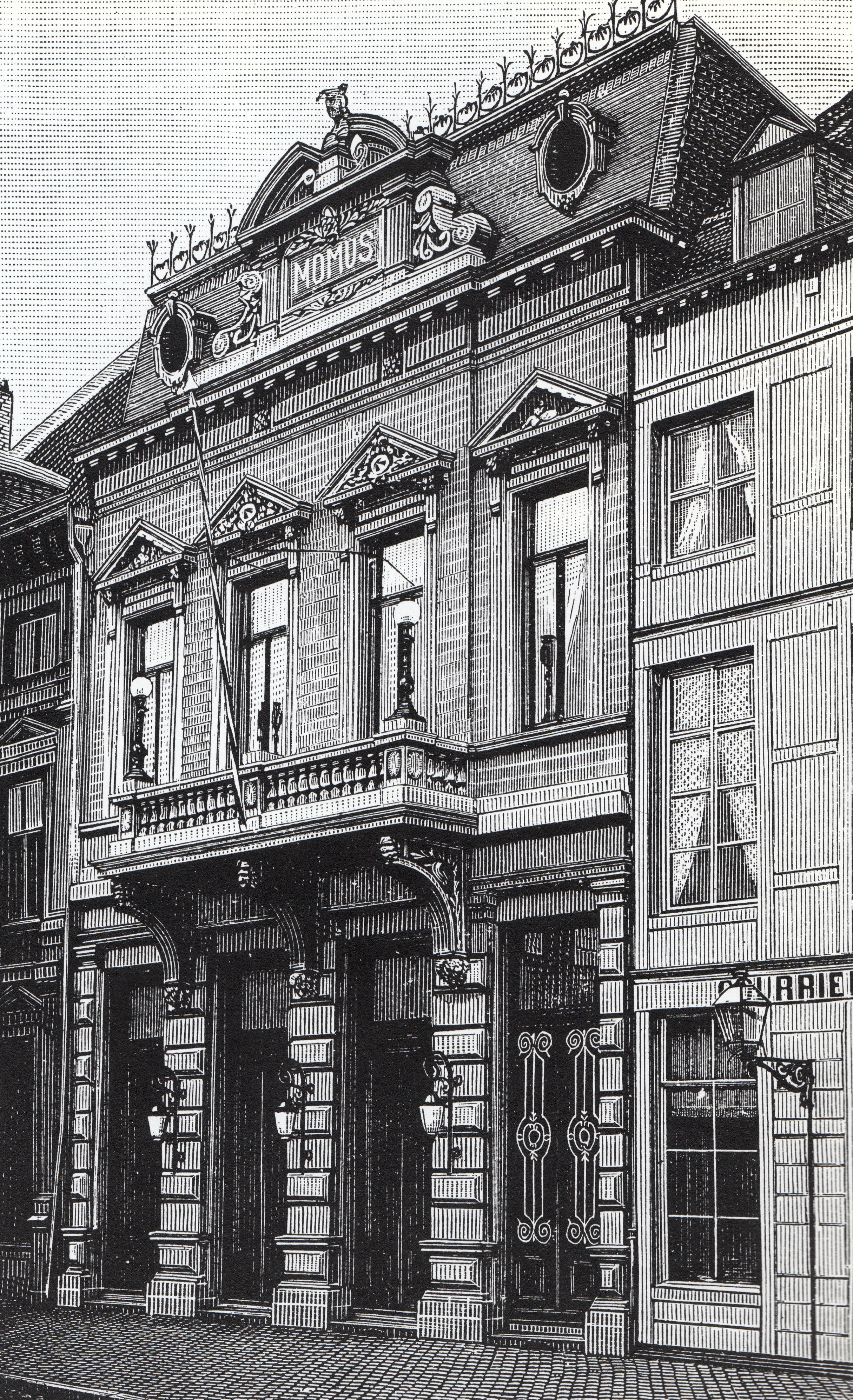 Tekening/lithografie van de herensociëteit en carnavalsvereniging Momus in Maastricht, kort na de opening van het nieuwe gebouw aan het Vrijthof.